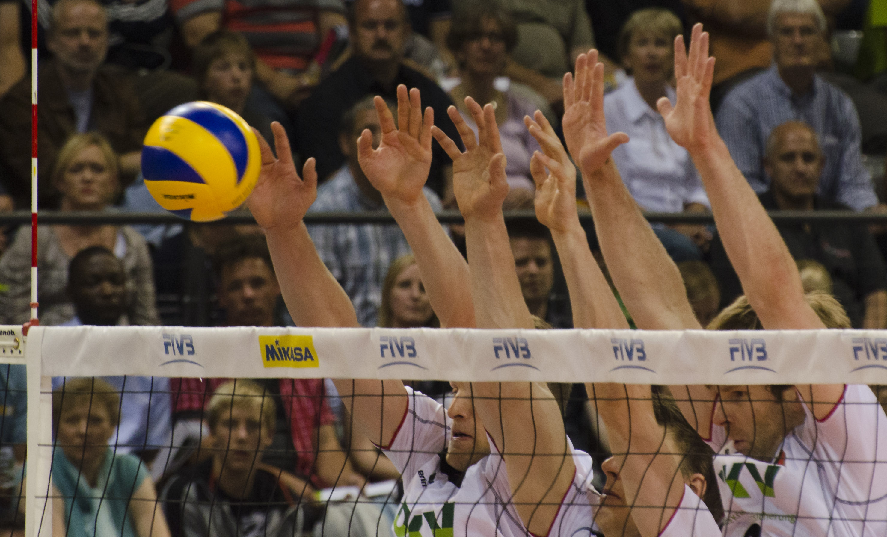 Volleyball: Dreierblock. Aufgenommen beim Weltligaspiel Deutschland - Japan, Stuttgart, 1.7.2011